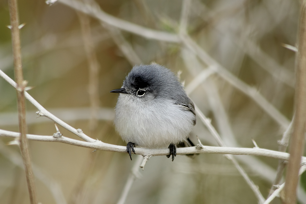 Polioptila caerulea. Yuma, Arizona.